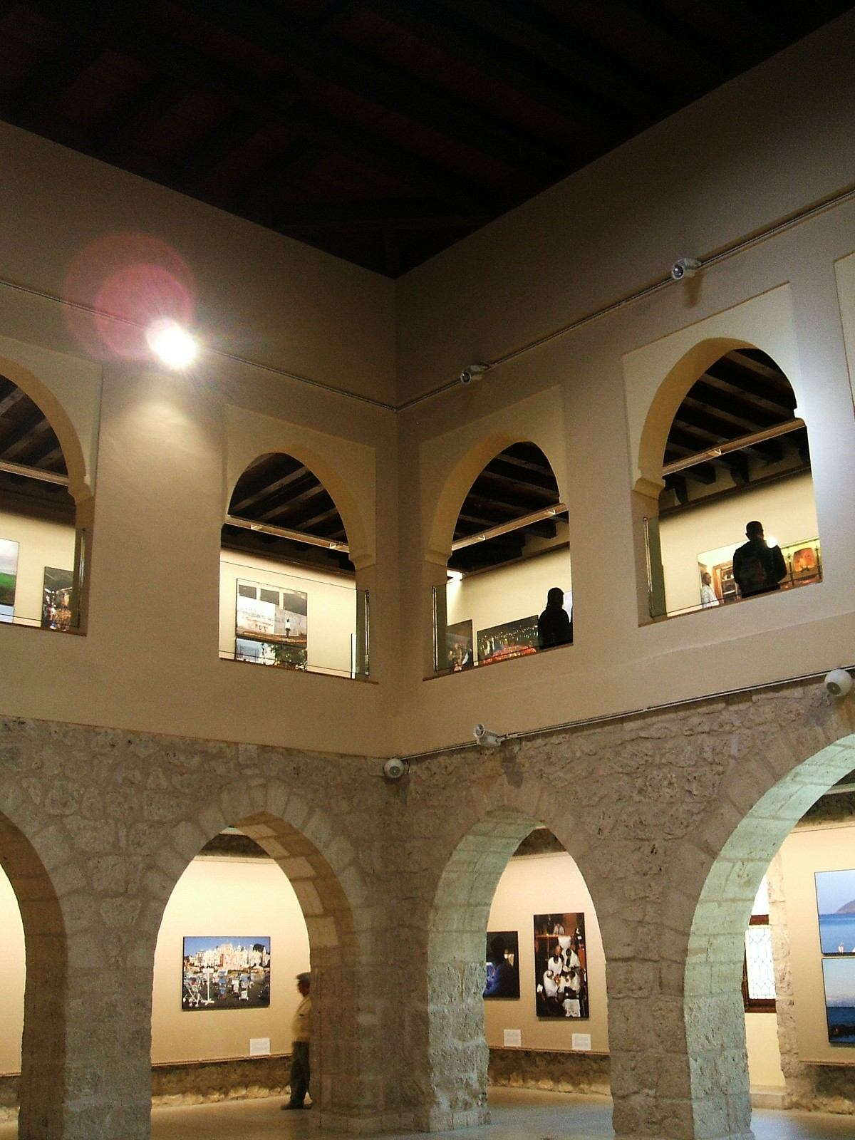 Sala interior del Arco de Santa María, Burgos.